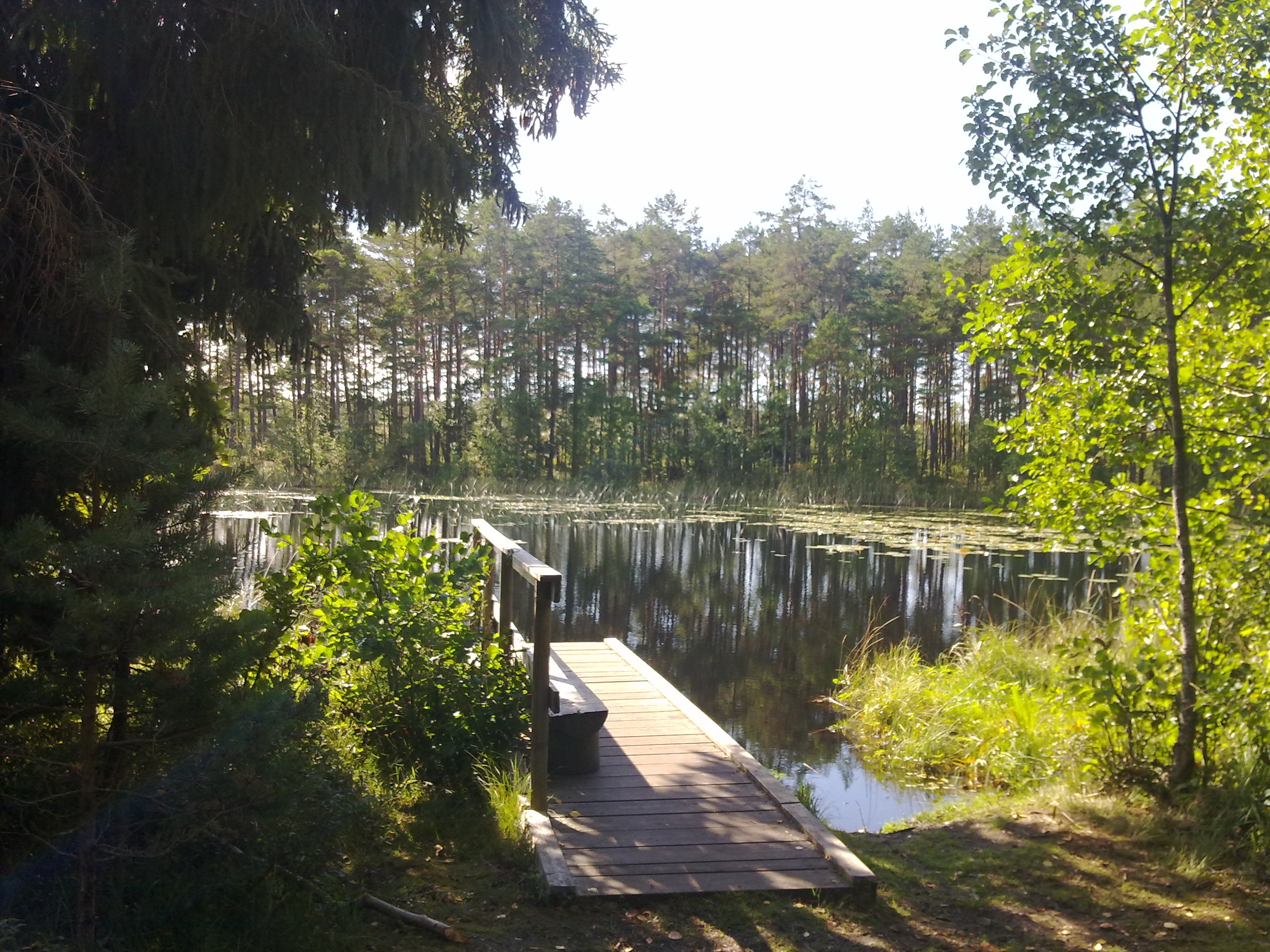 Vaade Nõva puhkealal asuva Allikajärve puhkekohalt järvele